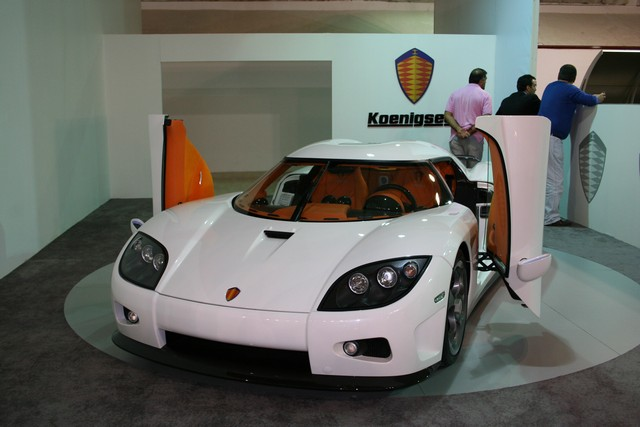 A Koenigsegg CCX Kuwait Motor Show 2007